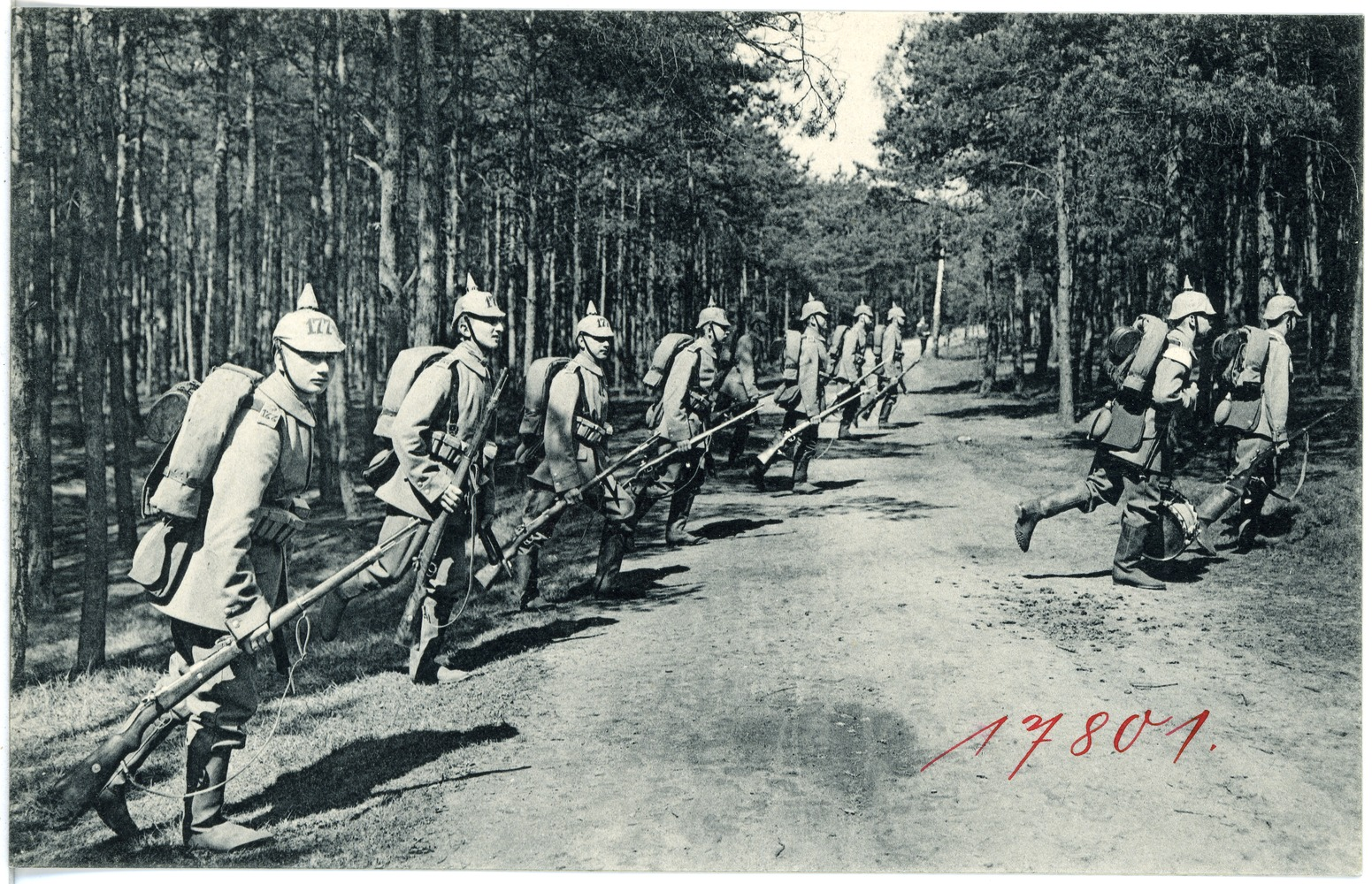 Dresden; Schützenlinie im Marsch This postcard is from publisher Brück & Sohn in Meißen ( postcard has a unique number 17801 and is available in a higher resolution at the publisher. This images was uploaded in a cooperation project between Wikipedians and the publisher.